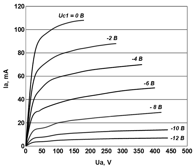 Анодные ВАХ выходного НЧ пентода (вообще-то это 6П14П при UC2=250В из Кацнельсона-Ларионова - но речь не о конкретной лампе, а о почти-идеальной ВАХ для мощных пентодов вообще). При малых Ua и больших отрицательных смещениях заметна "почти тетродная" нелинейность.